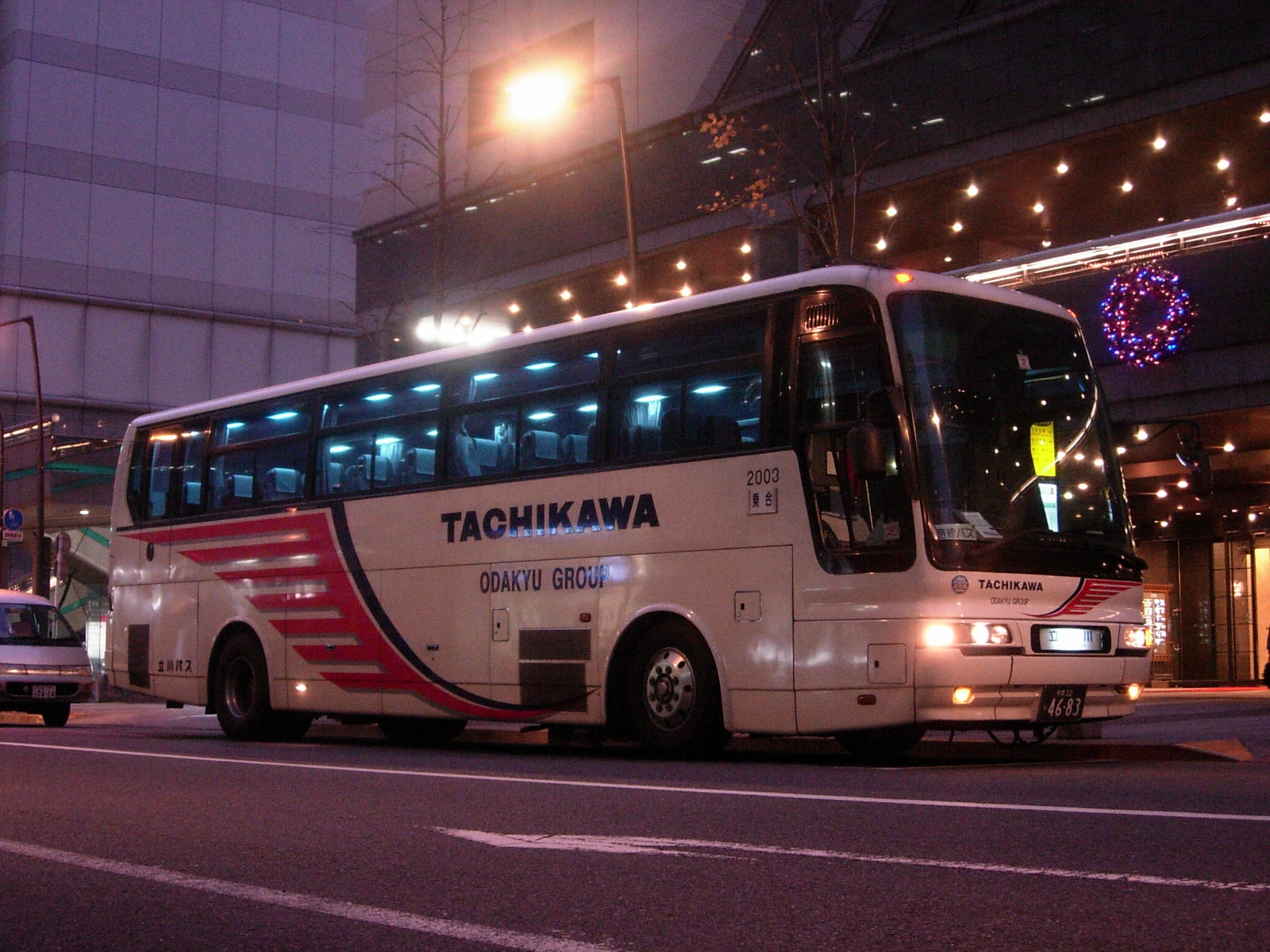 立川バスの空港連絡バス立川～羽田線 パレスホテル立川前にて